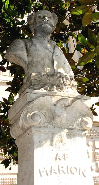 Monument commémoratif de Antoine-Fortuné Marion (1846-1900). Palais Longchamp (Marseille, France), face à l'aile du Muséum d'histoire Naturelle.